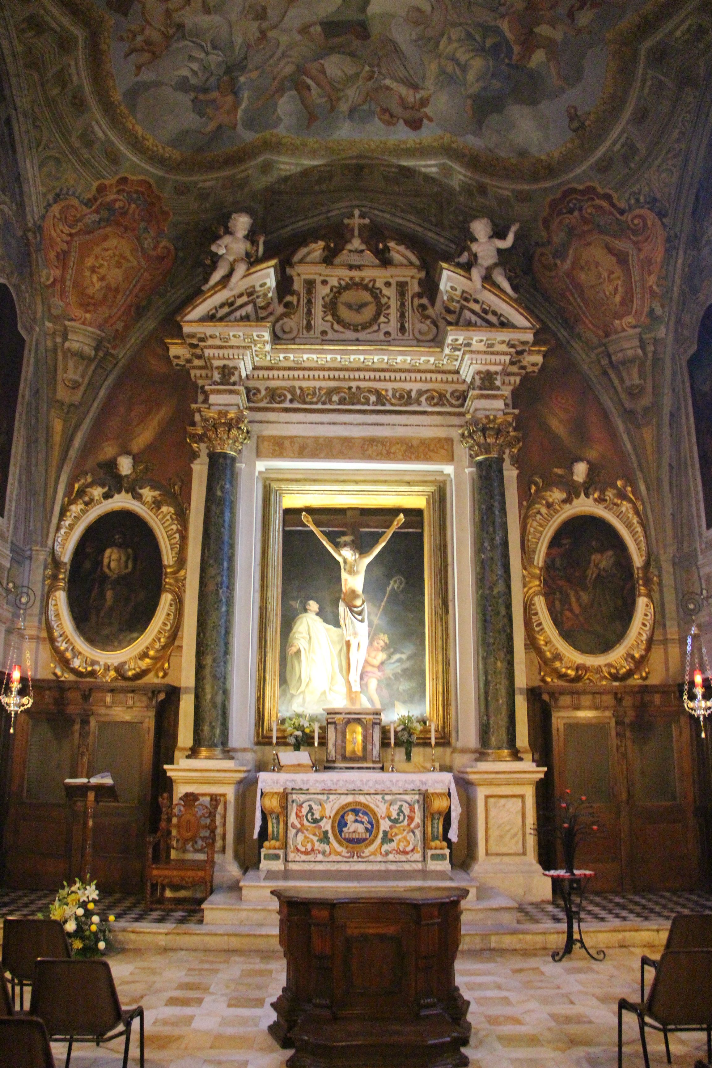 Abbazia di Monte Oliveto Maggiore